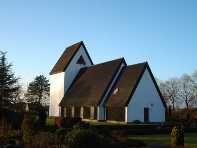 Church in Pindstrup, Jutland, Denmark